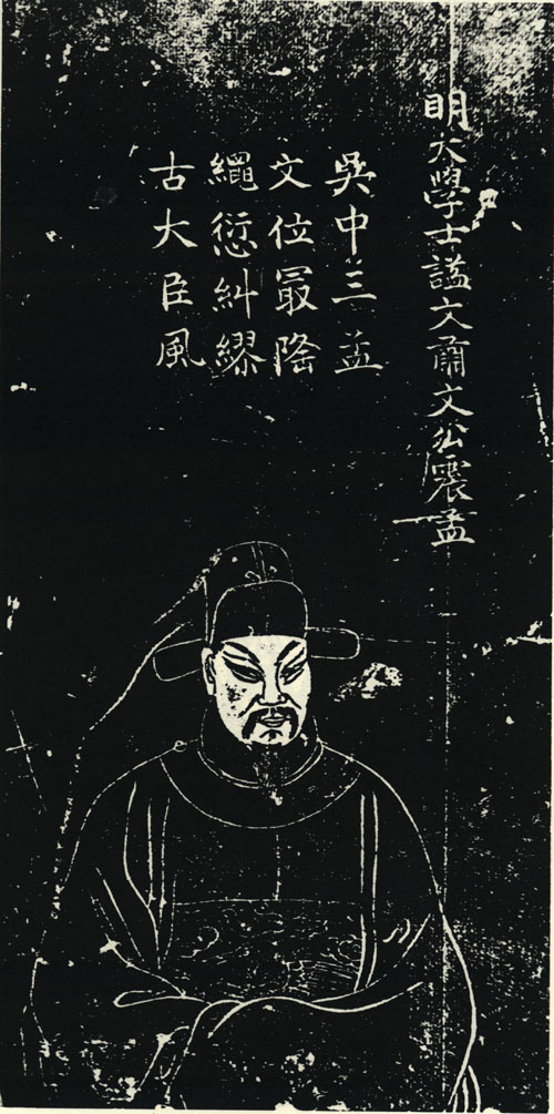 文震孟（1574年－1636年），字文起，号湛持，明南直隶长洲（今苏州市）人，文征明曾孙，文三桥之孙。明末政治人物，书法家。